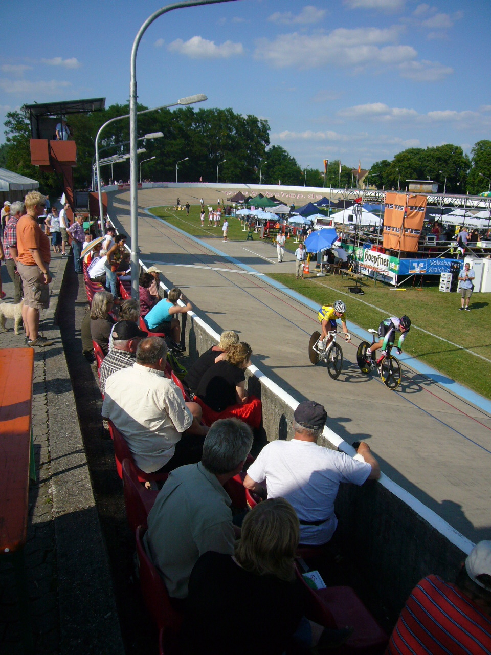 Die Radbahn des RSV Edelweiss Oberhausen in Oberhausen-Rheinhausen im Juli 2013 während der Deutschen Bahnrad-Meisterschaften